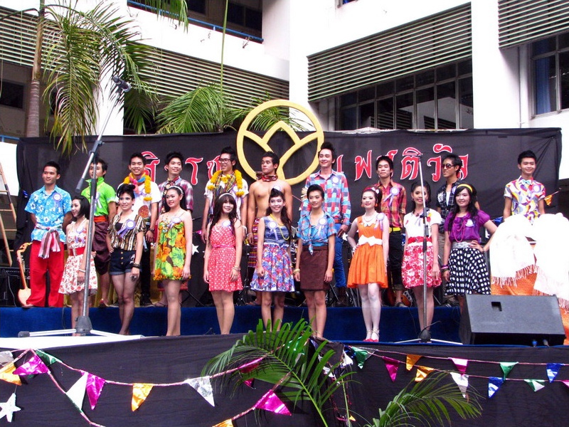 Facultad de Humanidades